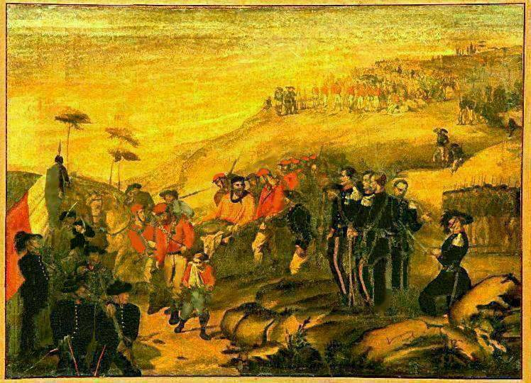 "Garibaldi ferito all'Aspromonte", ridotto e ritoccato, litografia acquerellata su carta legno